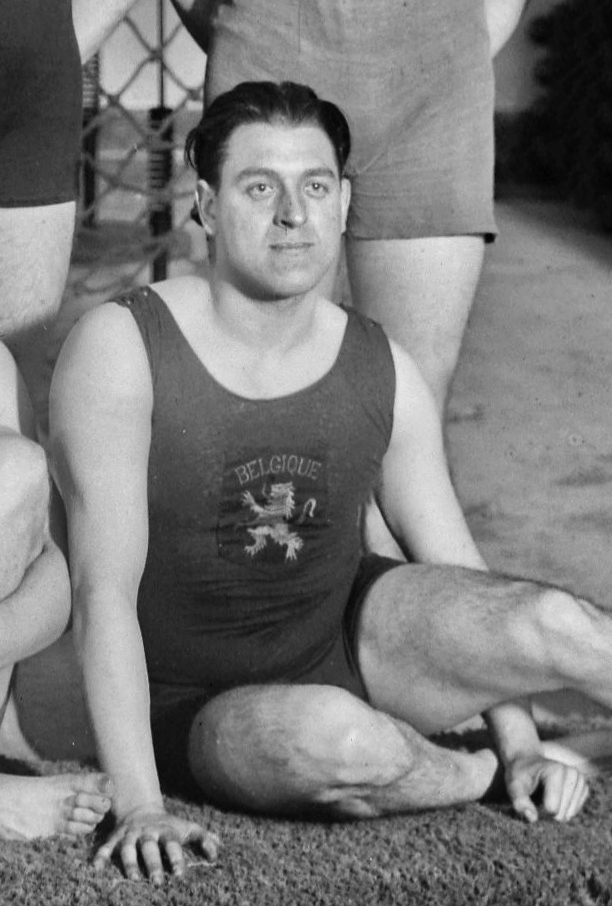 30-12-22, match France-Belgique, équipe de water-polo belge : Pierre Dewin : [photographie de presse] / [Agence Rol]